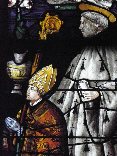 Yves Mahyeuc présenté par St-Yves. Basilique Notre-Dame de La Guerche-de-Bretagne, Vitrail de l'Annonciation (1536)